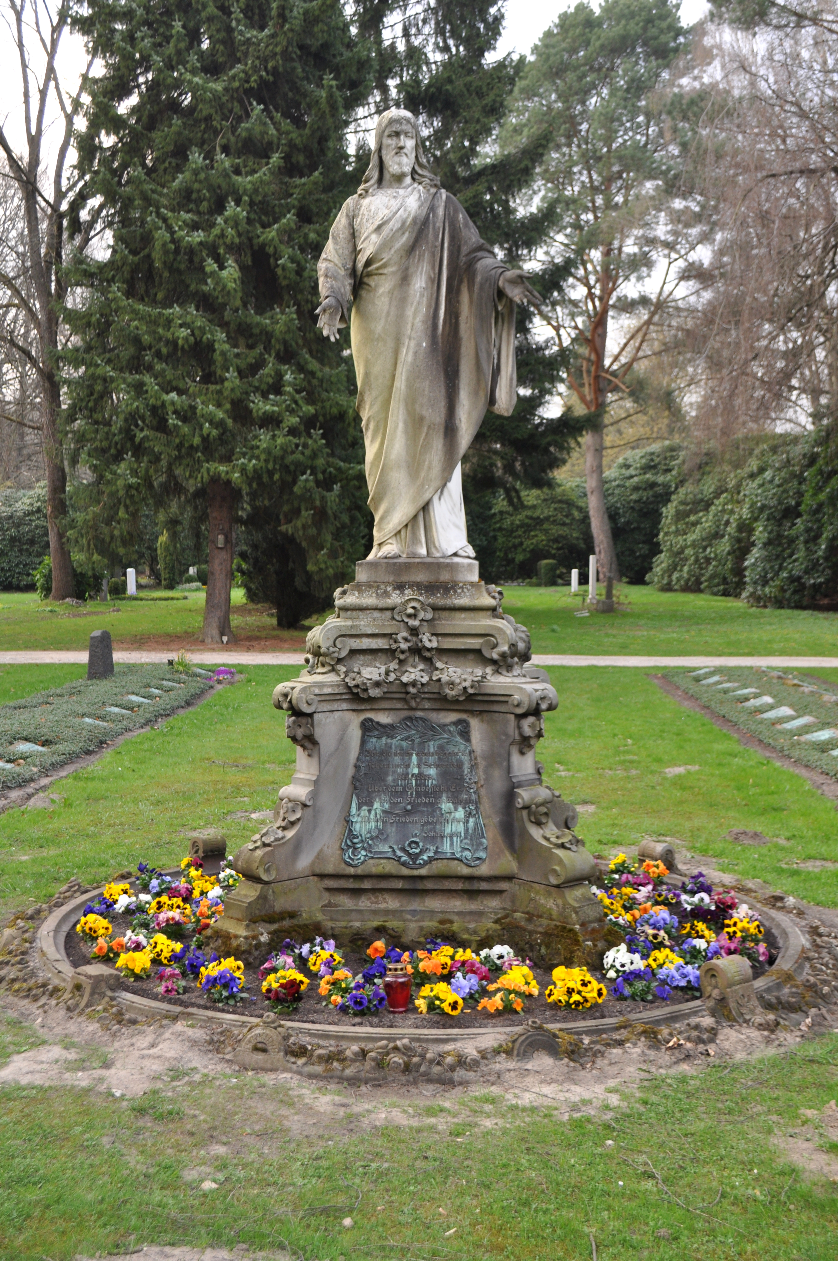 Denkmal auf der Grabstätte der Primus-Opfer auf dem Friedhof Hamburg-Ohlsdorf.